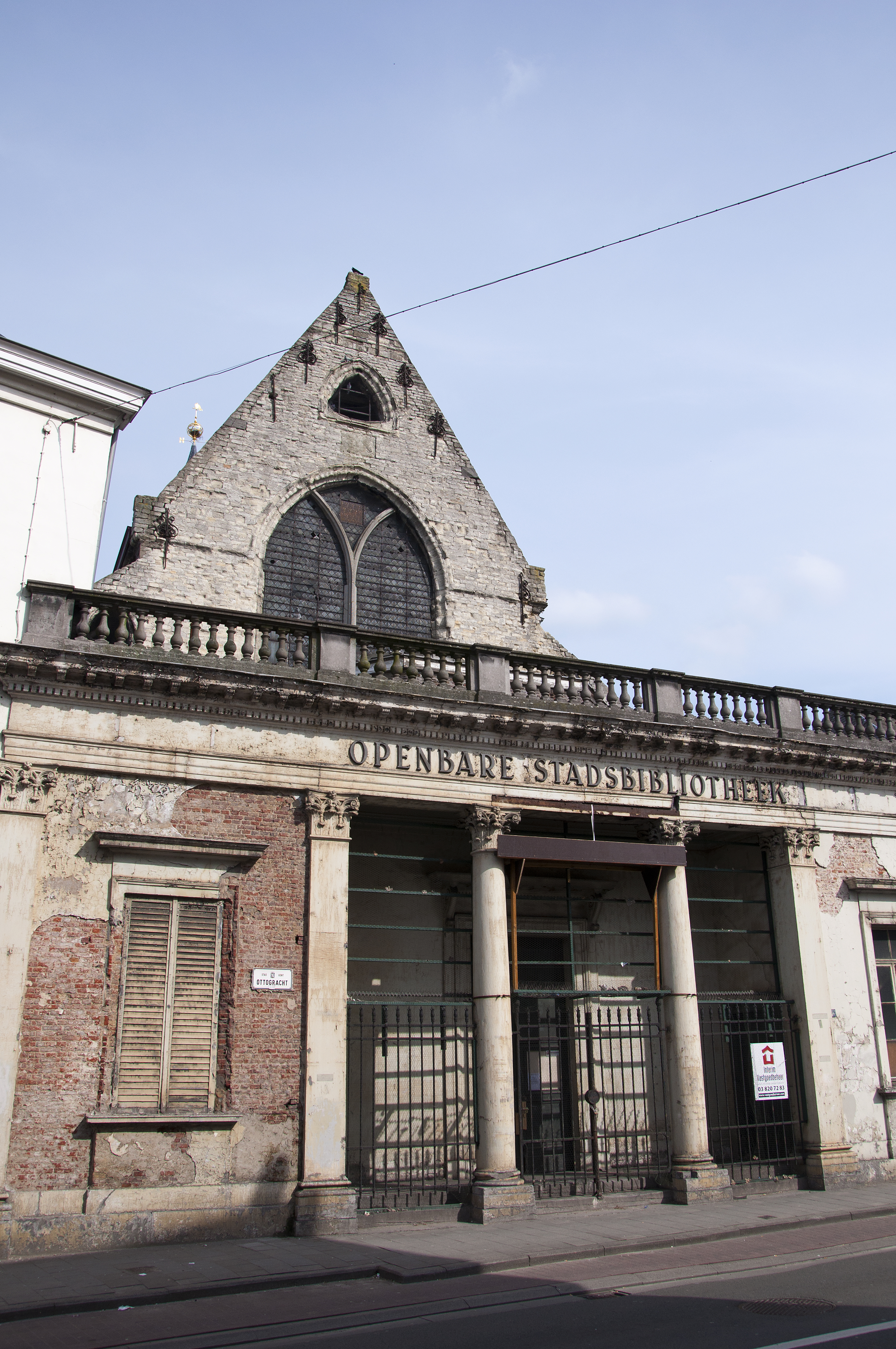 Gent Baudelokapel 14-04-2012